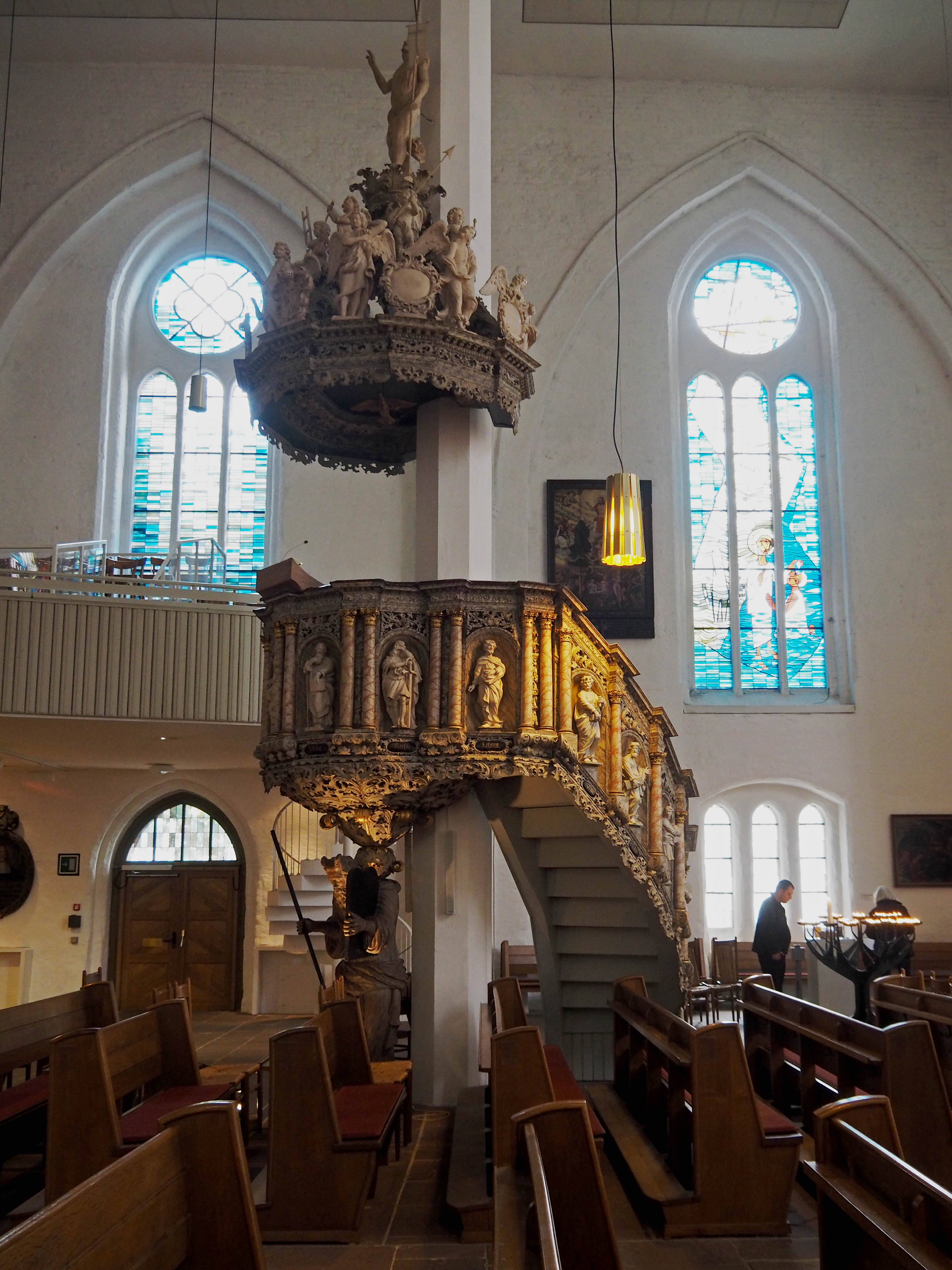 Kanzel in der St. Nikolai-Kirche Kiel